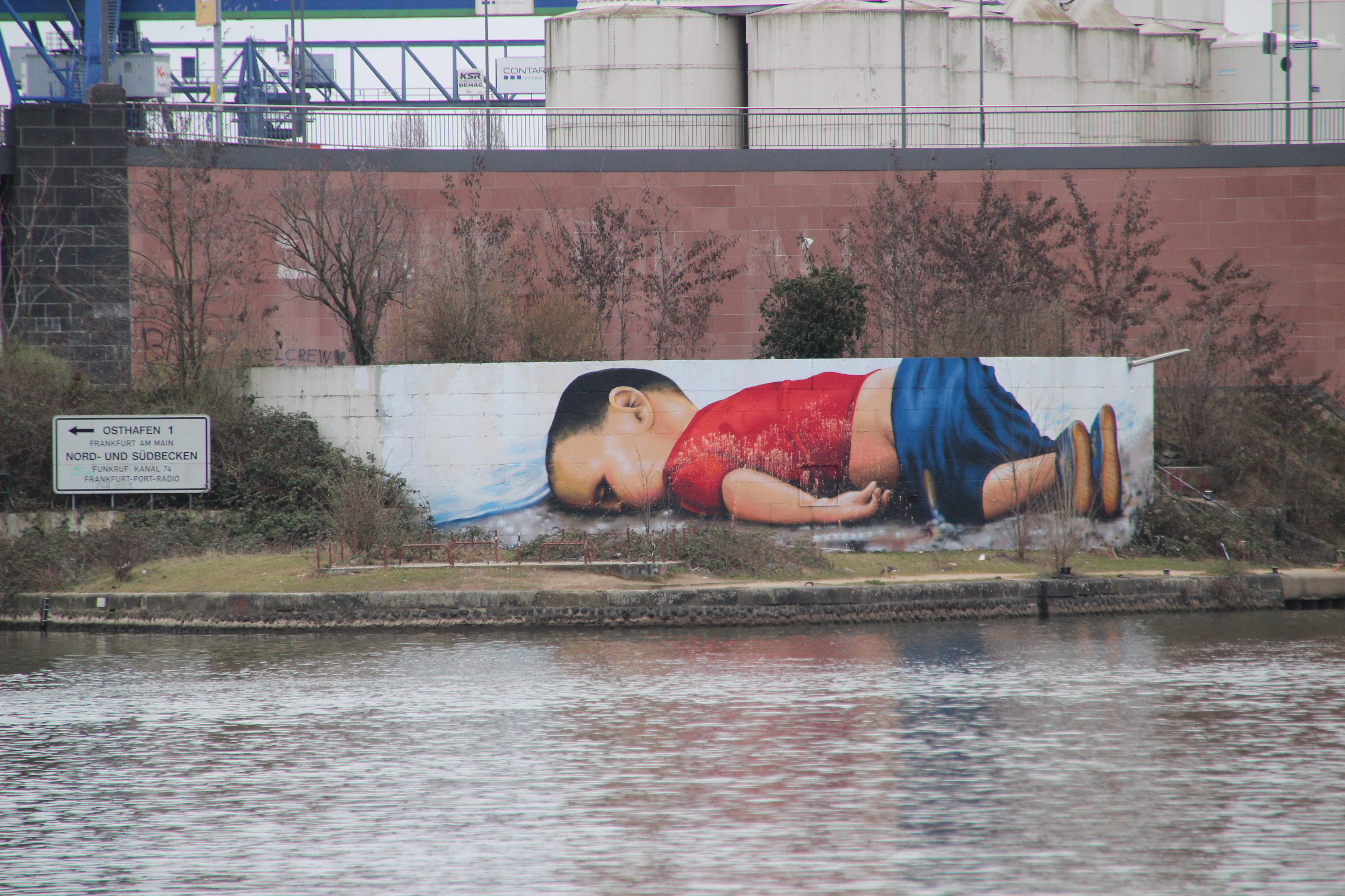 Bildinhalt: Der tote syrische Junge Aylan Kurdi. Wandmalerei von Justus Becker und Oguz Sen am Frankfurter Osthafen mit Beschädigungen Aufnahmeort: Frankfurt am Main, Deutschland